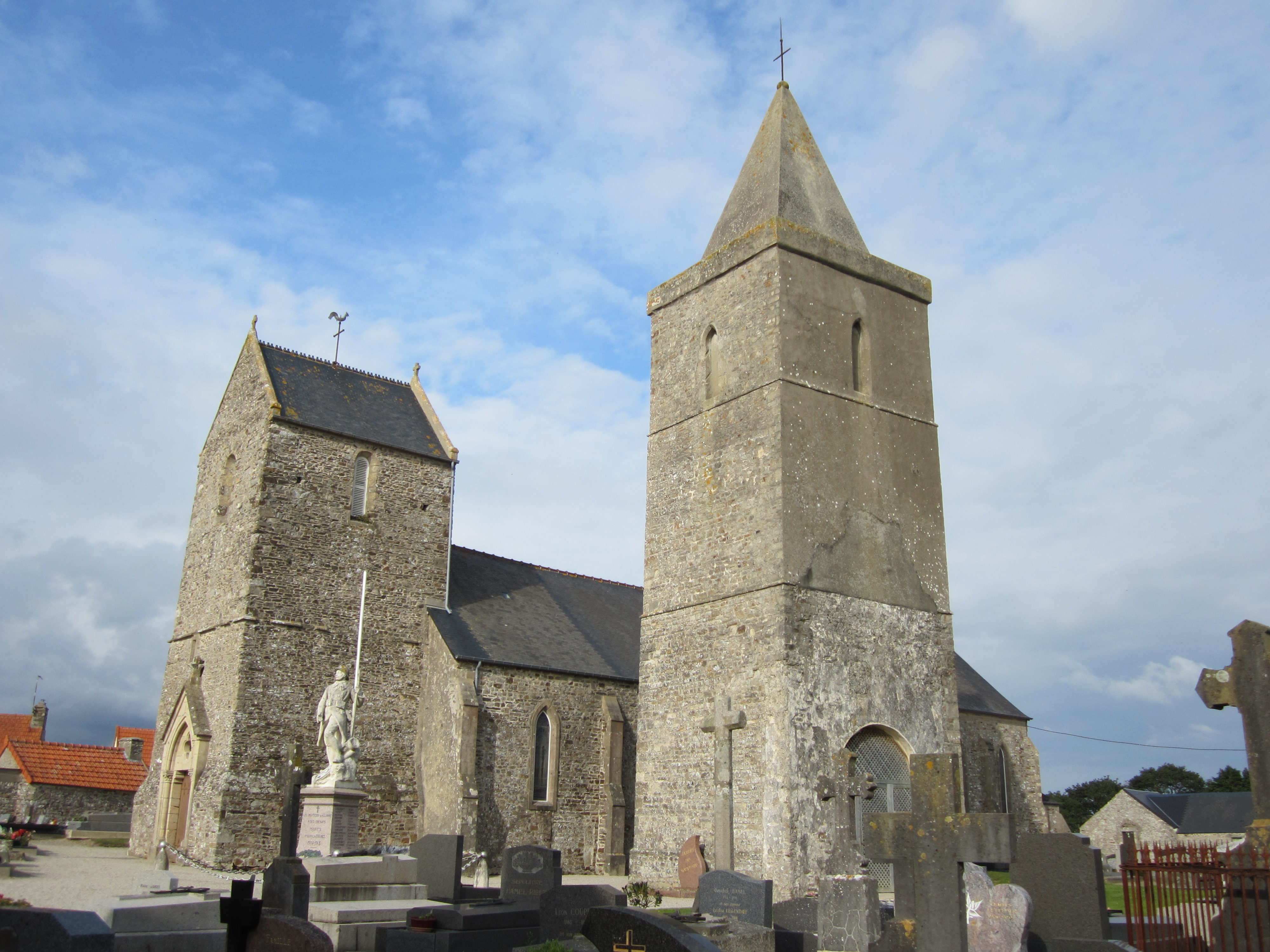 églises des Les Moitiers-d'Allonne